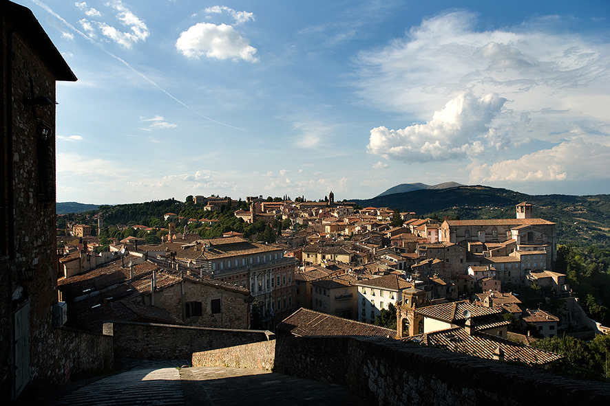 Cono visuale 19 - Perugia - Porta sole This is a photo of a monument which is part of cultural heritage of Italy.